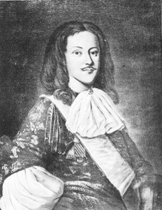 Burchard von Ahlefeldt, geboren 4. Oktober 1634 in Flensburg, gestorben 9. September 1695.